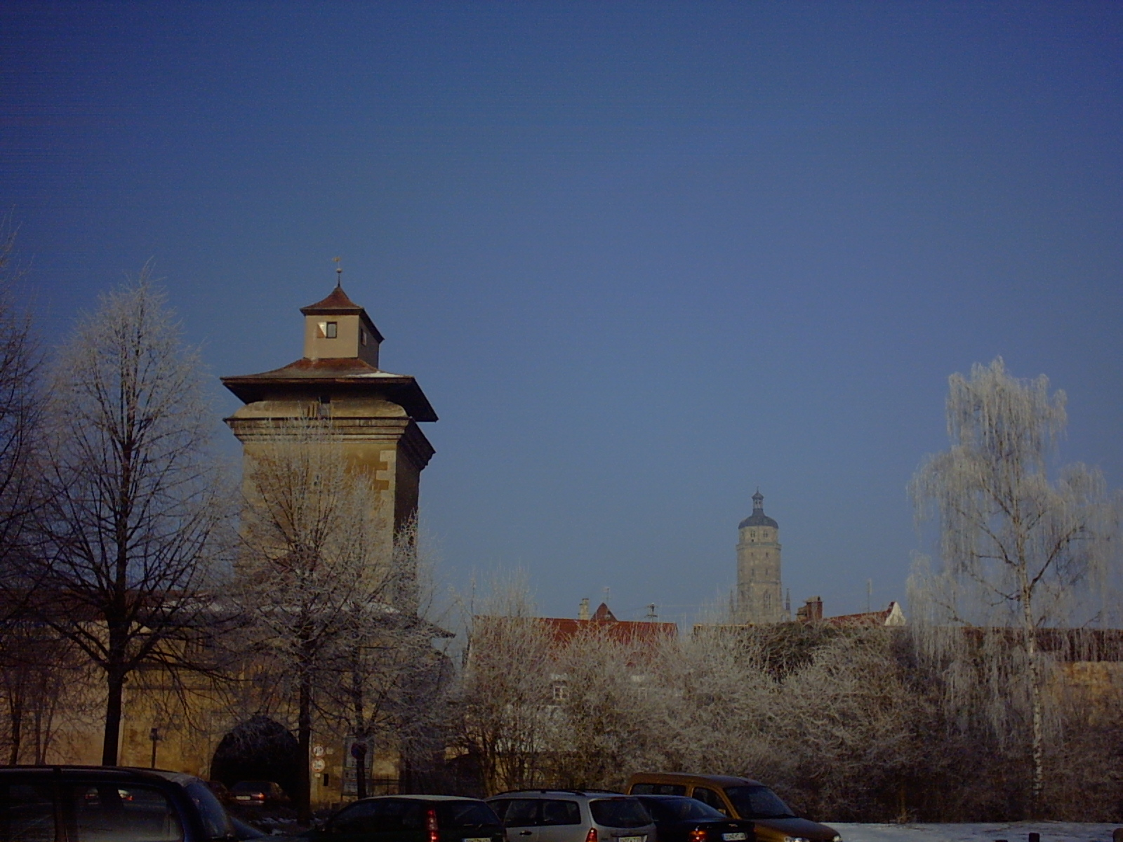 Reimlinger Tor Nördlingen